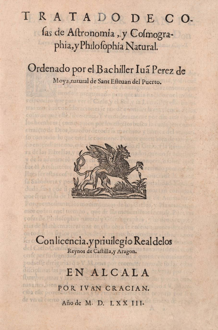 Portada del libro "Tratado de cosas de Astronomia, y Cosmographia y Philosophia Natural", publicado por Juan Pérez de Moya en Alcalá de Henares, en 1573.